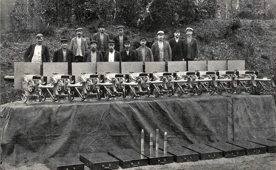 Kanonarbetare vid Finspångs bruk.